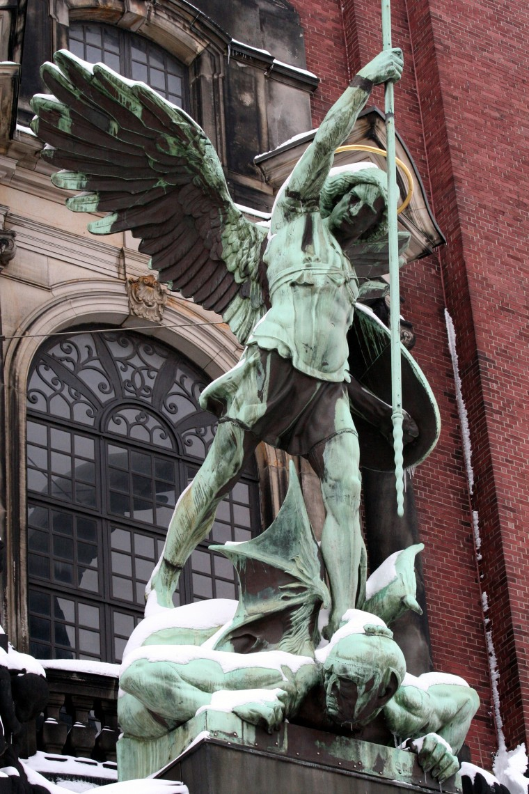 Statue des Erzengels Michael von August Vogel über dem Portal von St. Michaelis in der Hamburger Neustadt. This is the photograph of an architectural monument. It is part of the list of cultural monuments of Hamburg, no. 51